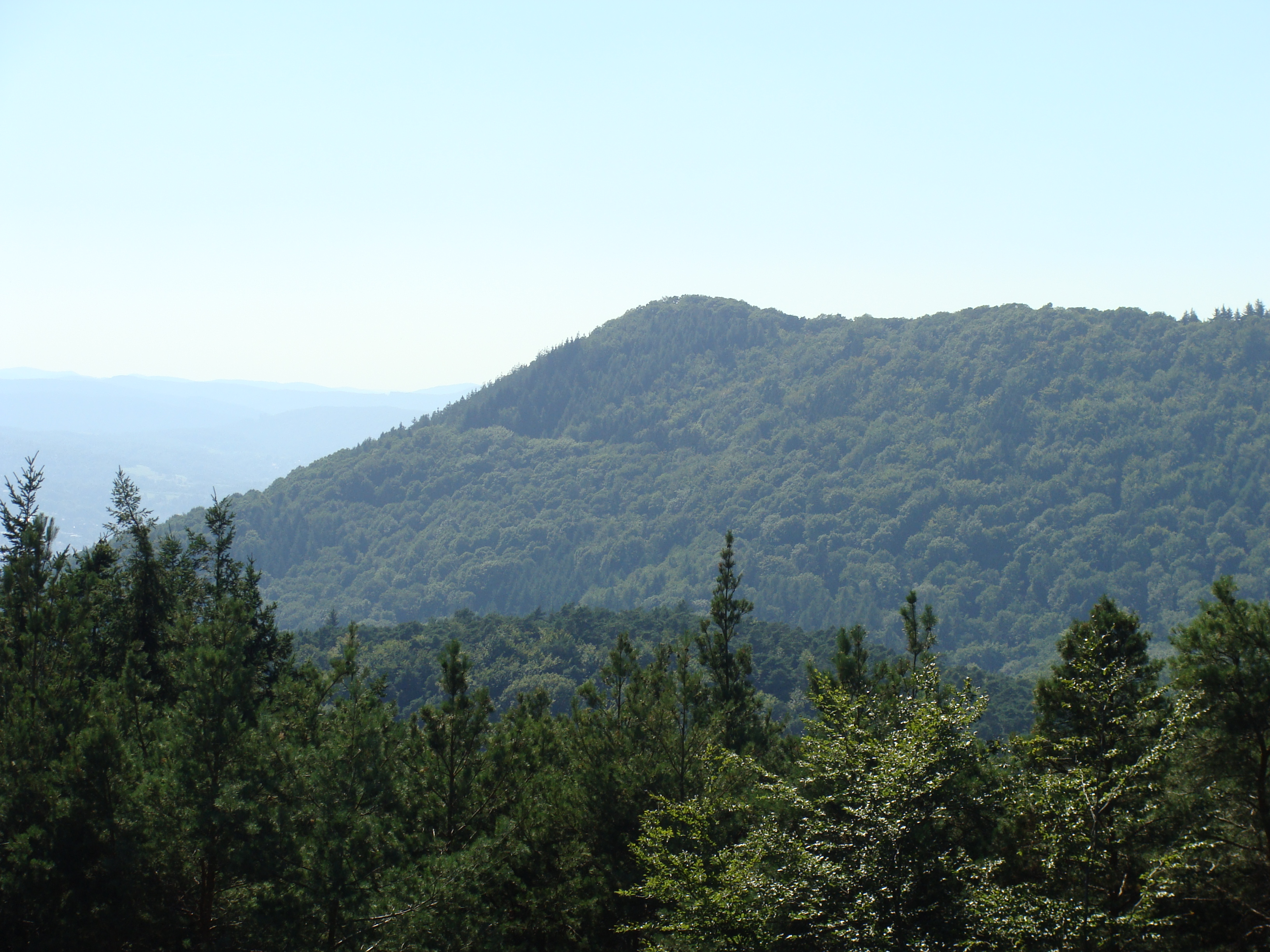 Blick von der Trifelsblick-Hütte auf dem Teufelsberg südwestwärts zum Südsporn des Orensberg (Ort des Orensfelsens)